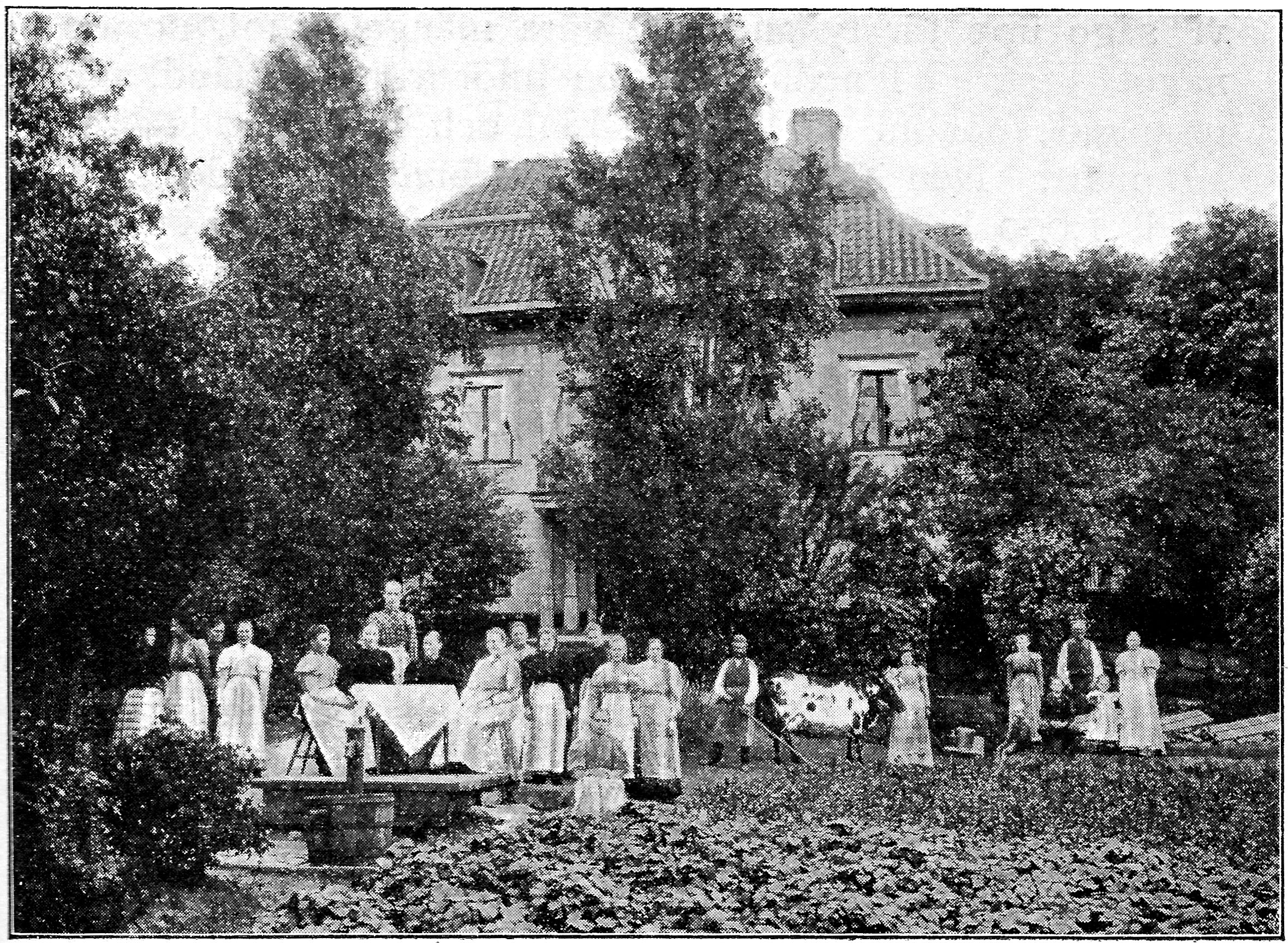 Skyddshemmet för värnlösa kvinnor som tillhandagavs till Elsa Borg och Missionen i Vita bergen 1879 och drevs av missionen till 1928